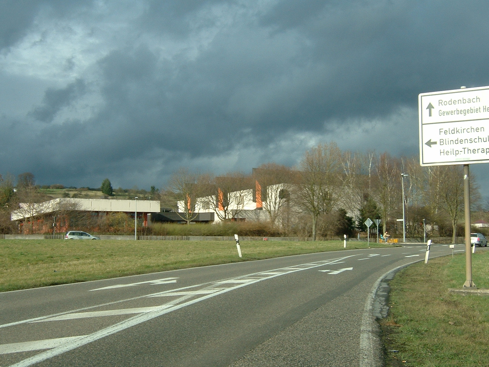 Landesblindenschule Neuwied F.Lang eig.Bild 25.02.07